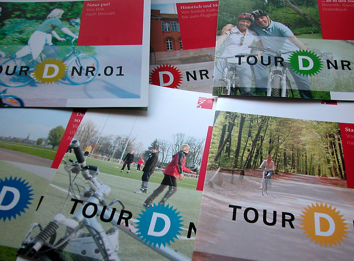 Fahrrad in Düsseldorf:"Tour D"